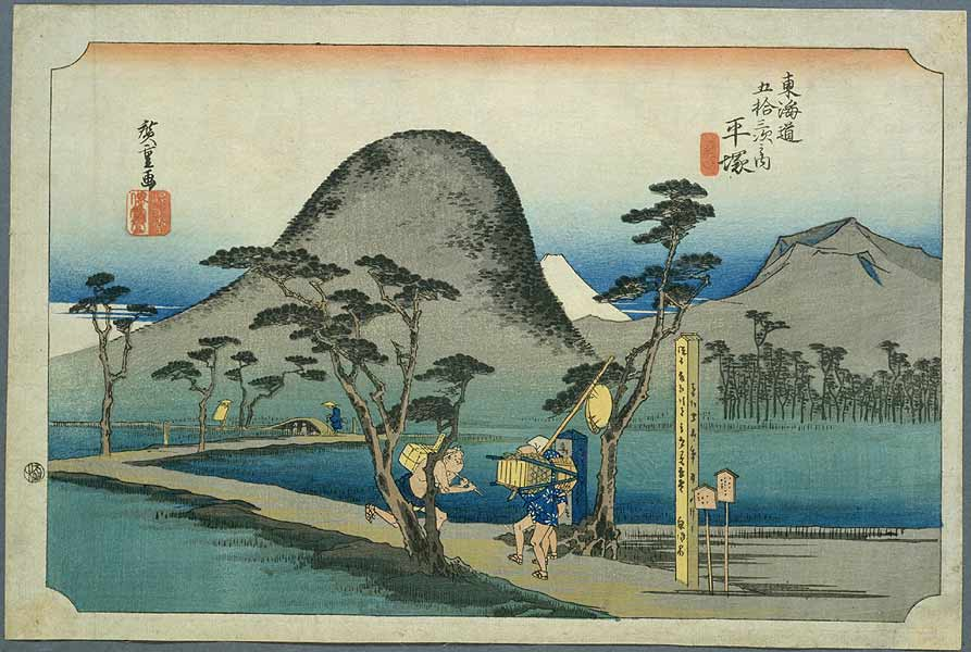 Hiratsuka on the Tokaido, ukiyo-e prints by